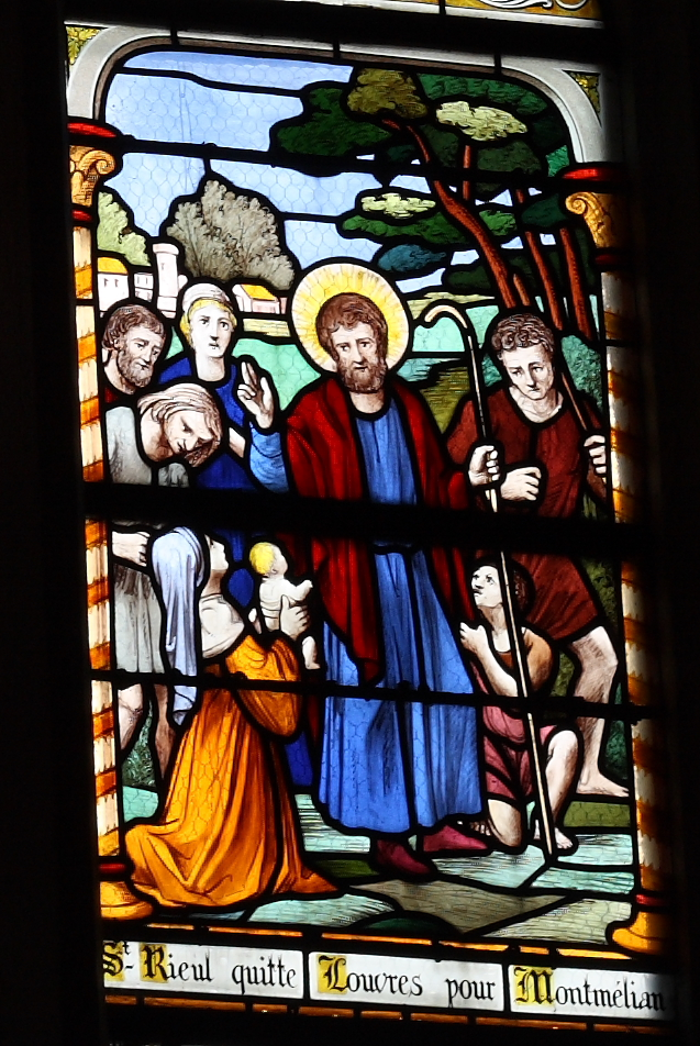 Bleiglasfenster (Ausschnitt) in der katholischen Pfarrkirche Saint-Justin in Louvres, Darstellung: hl. Rieul de Senlis